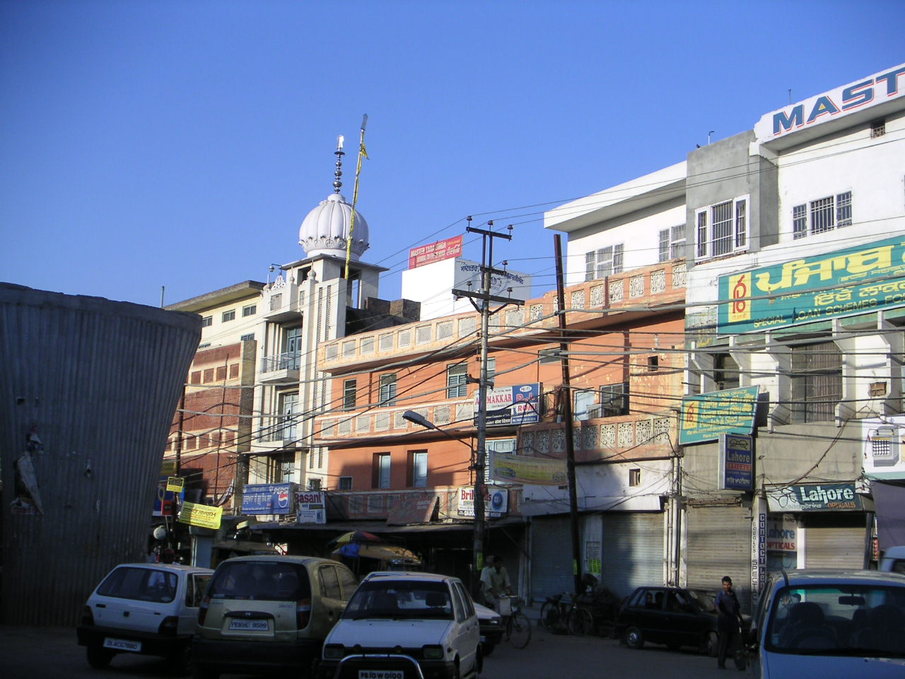 Ludhiana, Punjab, India. Photo: Soman